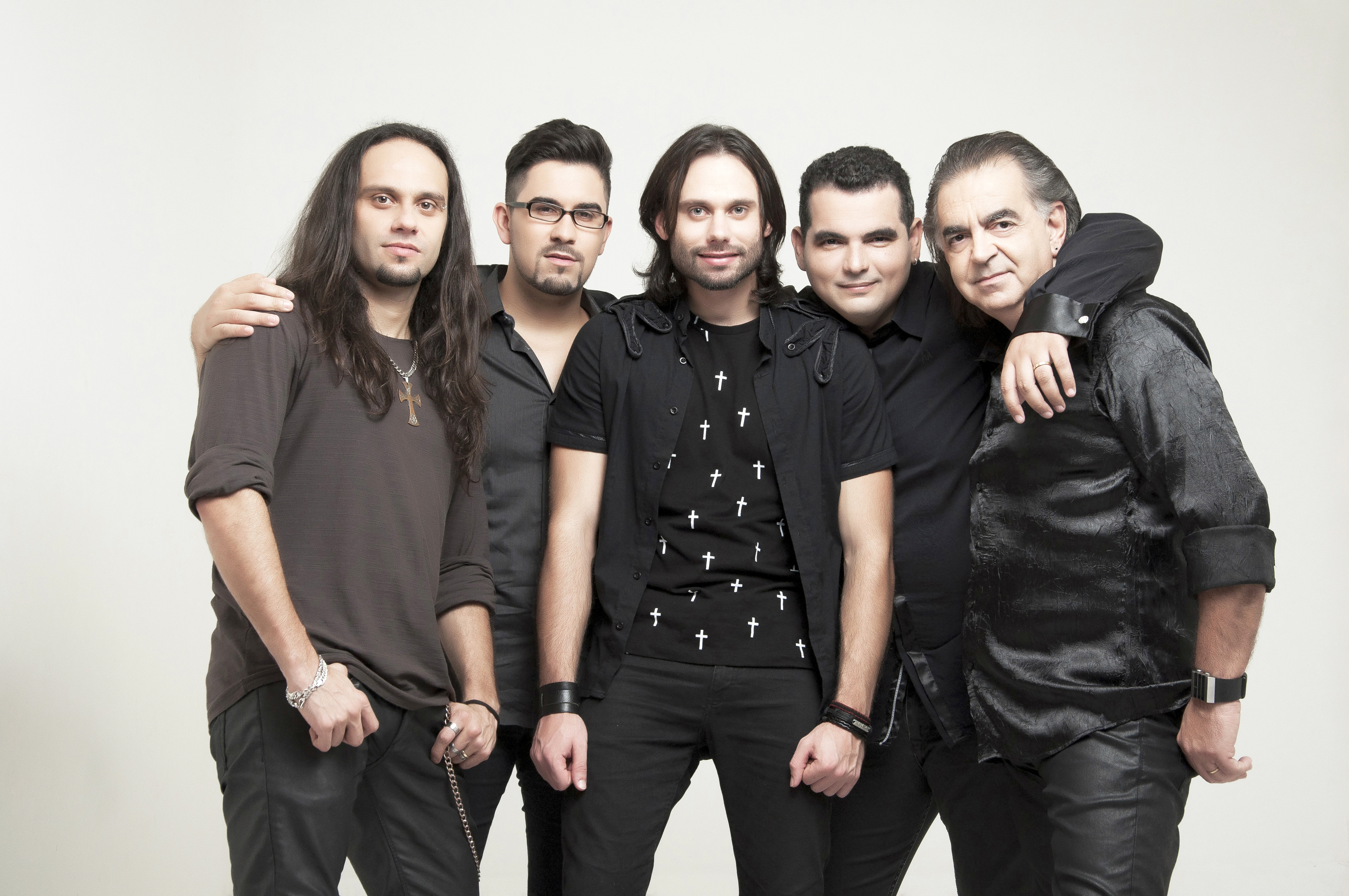 Formação em 2017